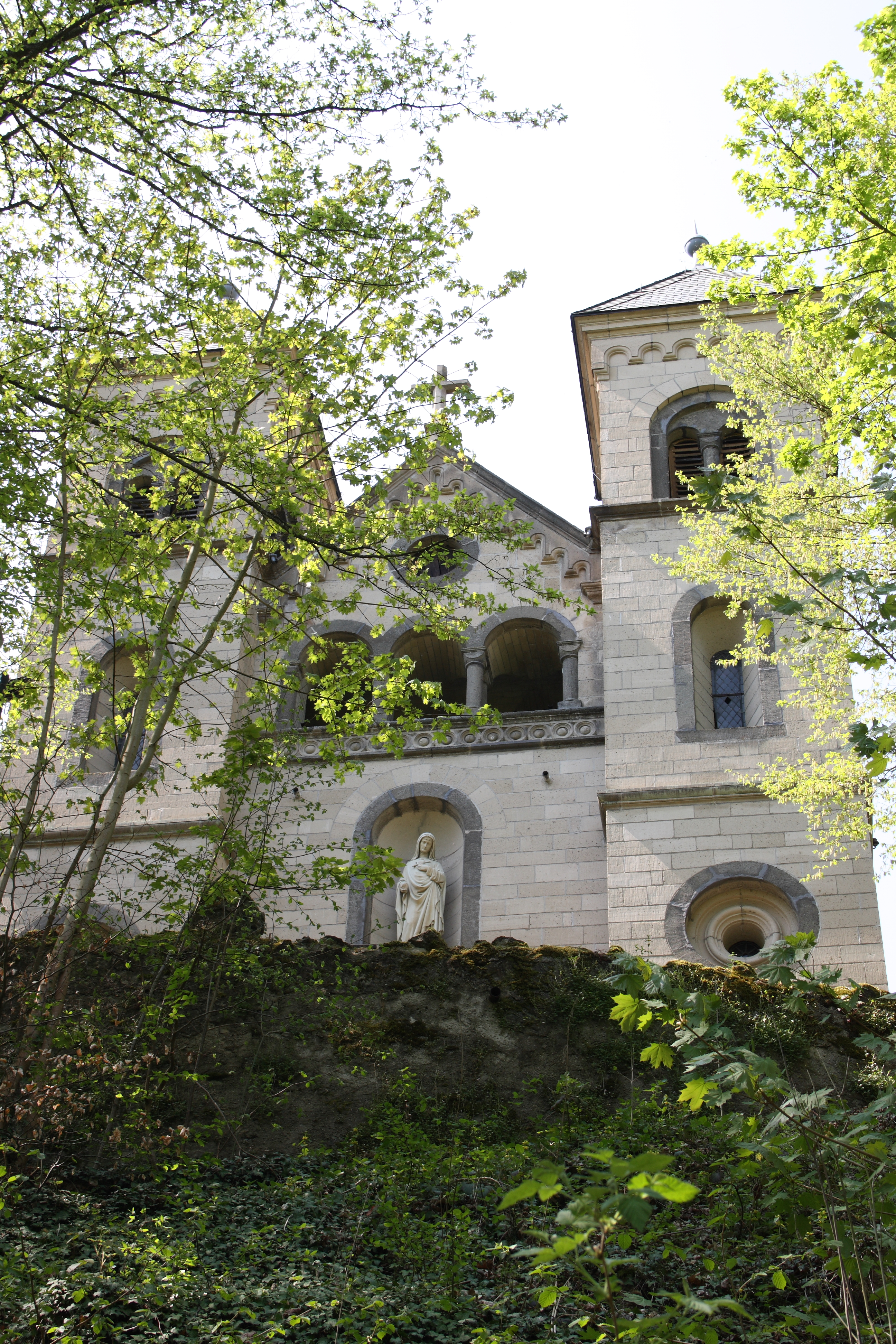 katholische Kreuzkapelle in Kempenich